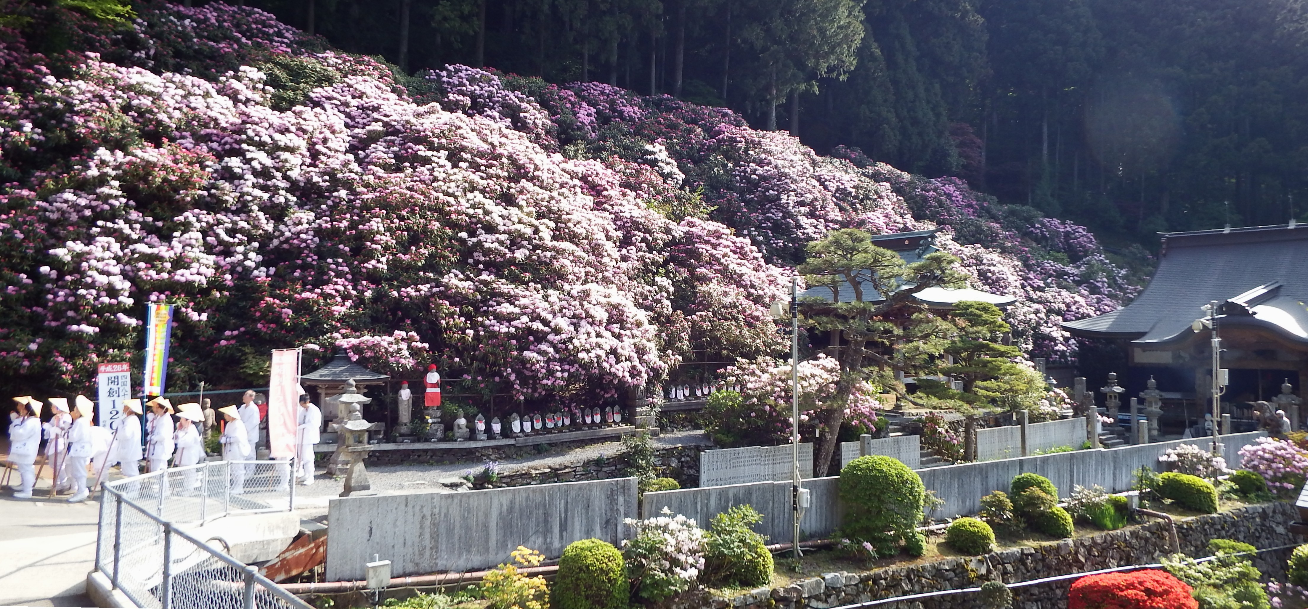 横峯寺の境内はシャクナゲが咲き誇る